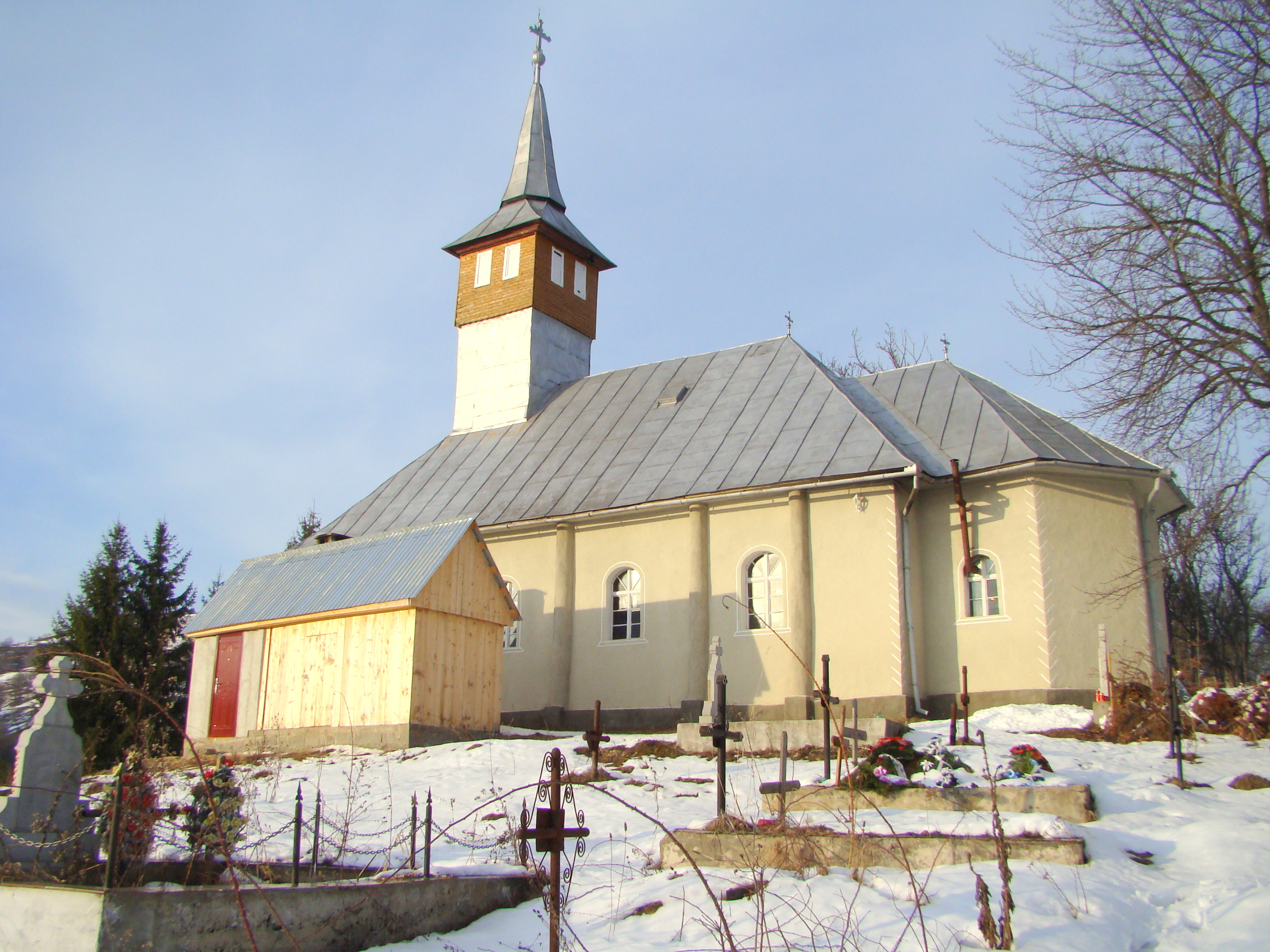 Biserica de lemn „Sf.Mare Mucenic Gheorghe” din Certege, județul Alba.